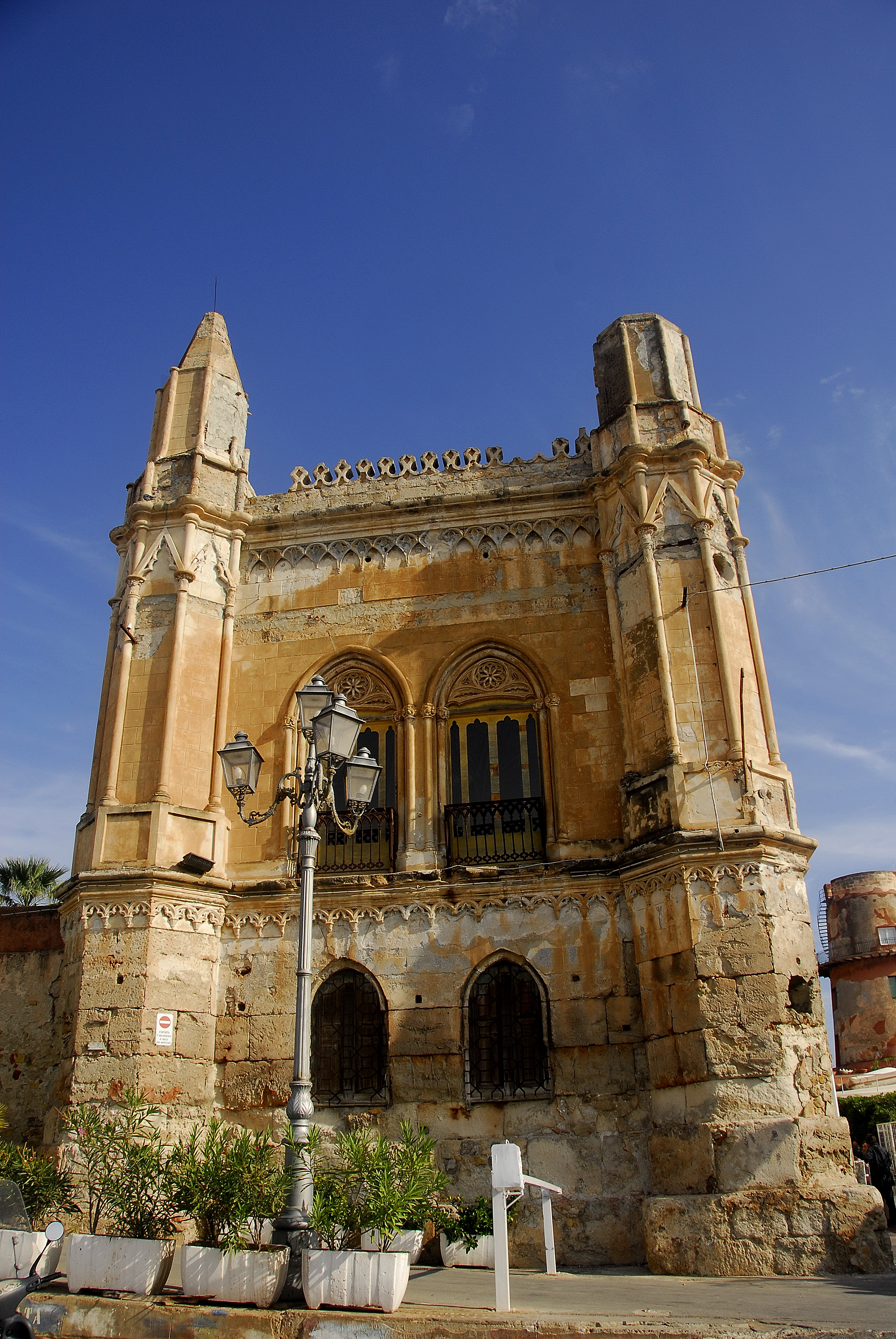 Palermo, ITA